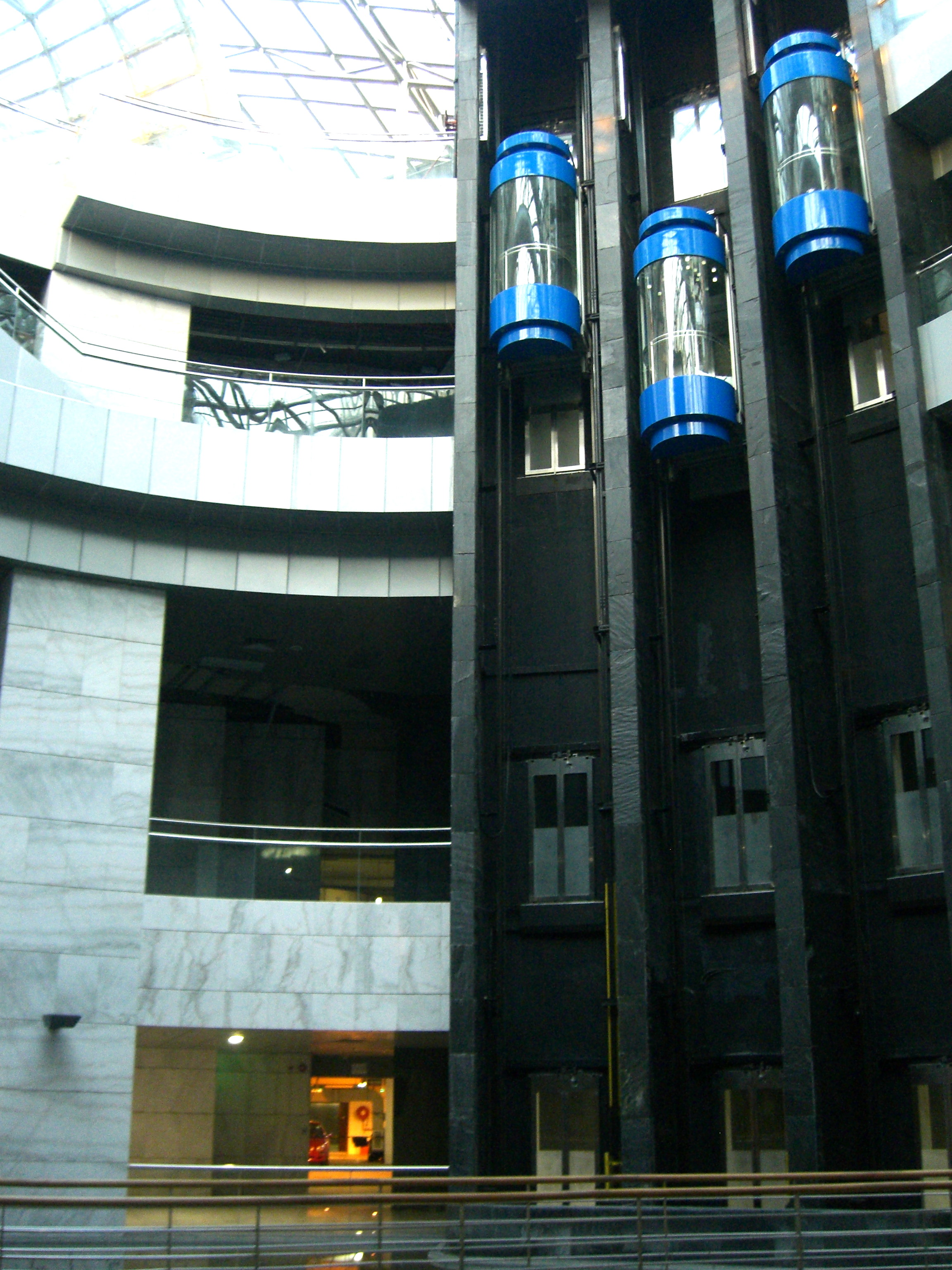 Centro de Praça de Ferreira do Amaral